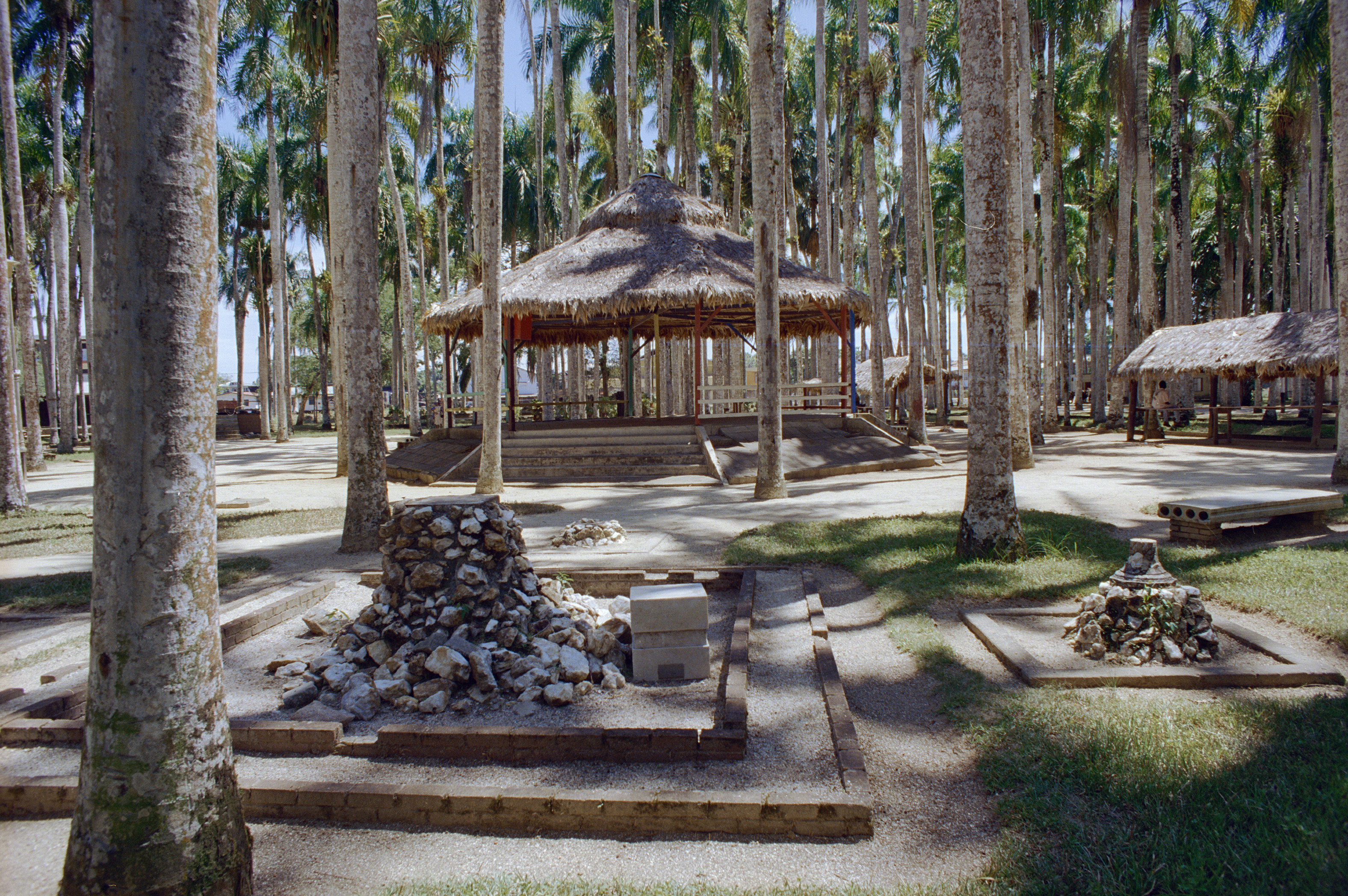 Palmentuin: Overzicht van de palmentuin (opmerking: Suriname Reis Loek Tangel)